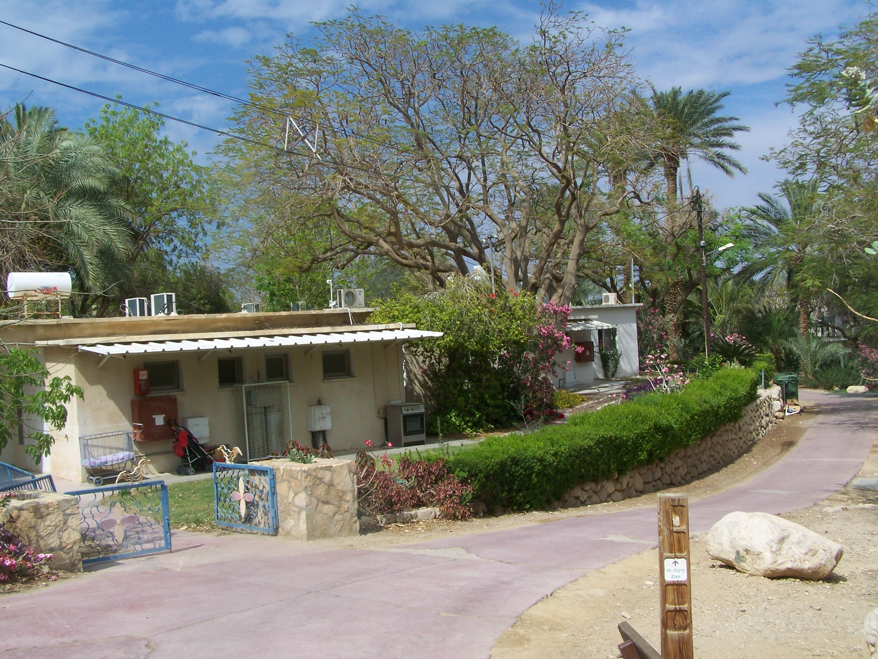 Road in Ein Gedi